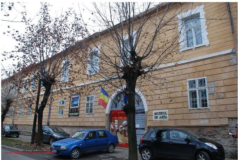 Oficiul Salinelor, azi Muzeul de Artă